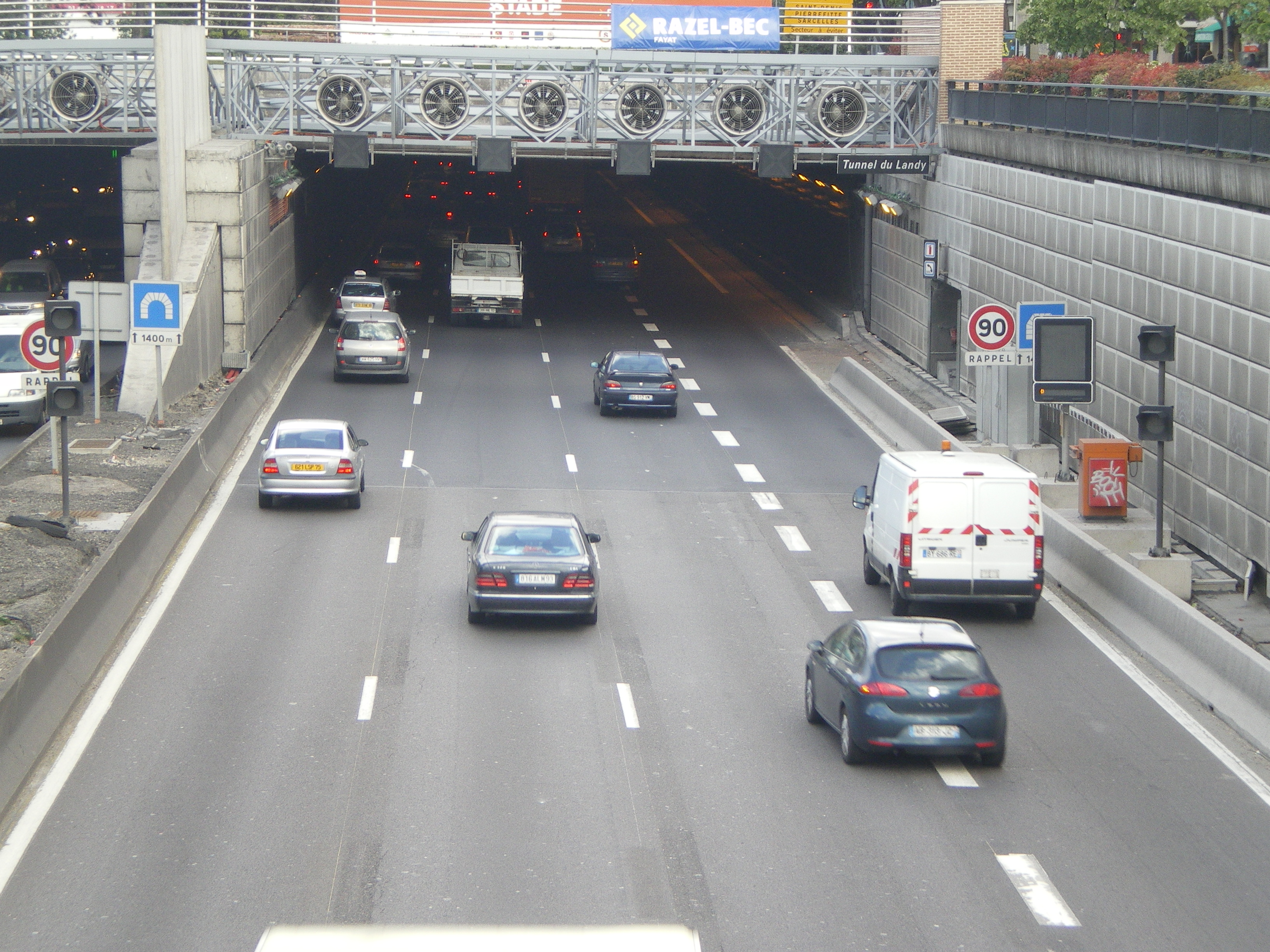 Portail Sud du tunnel du Landy